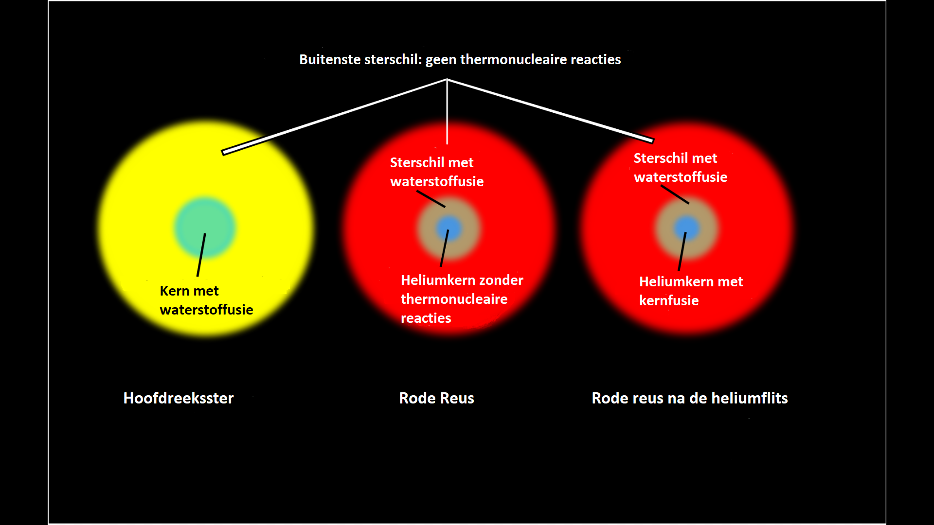 schema